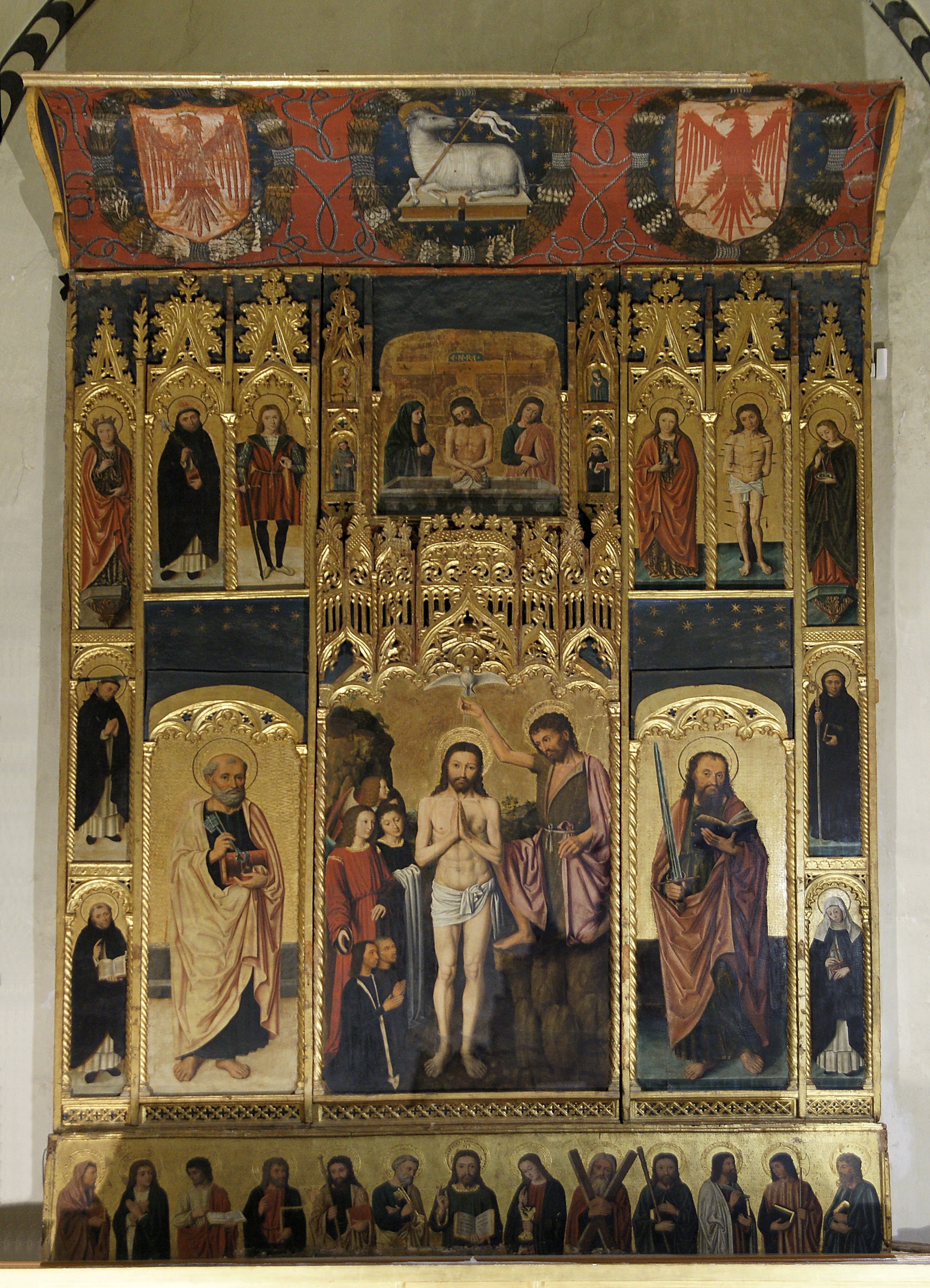 Eglise du Couvent des Dominicains - Rétable du Baptême du Christ (sans bandes latérales) - Attribution peu contestable à Louis Bréa (1495)